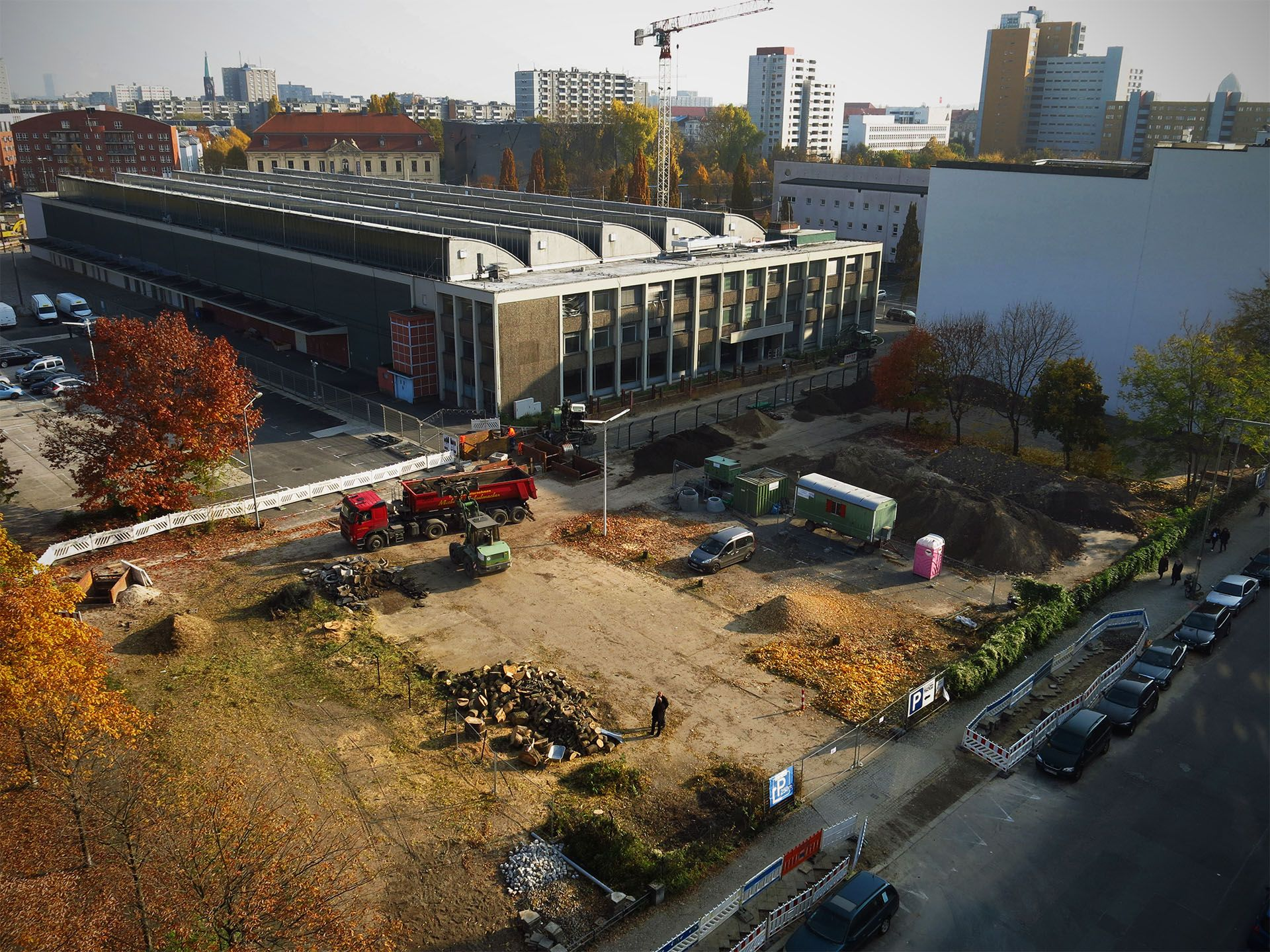 Webcamansicht vom Baufeld taz-Neubau an der Friedrichstraße am 28.10.2015